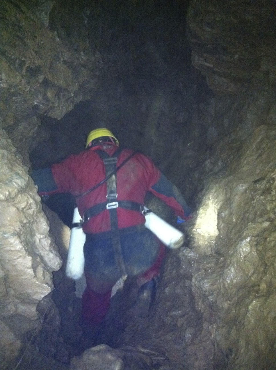 Höhlentaucher auf dem Weg zum "Stillen See" der Kluterthöhle in Ennepetal